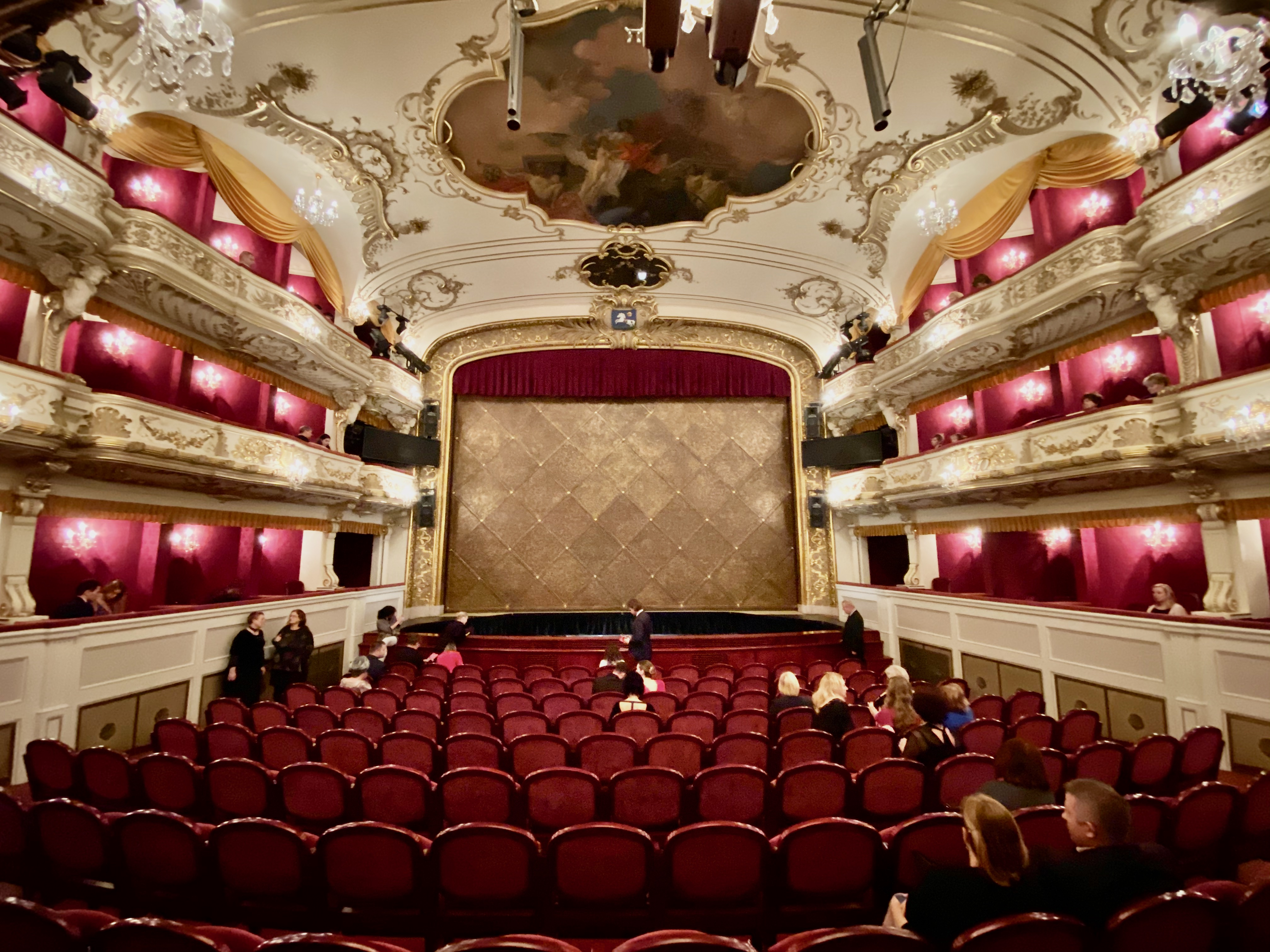 Teatre Antonín Dvořák - Interior